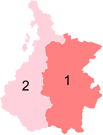 Résultats des élections législatives des Hautes-Pyrénées en 2012